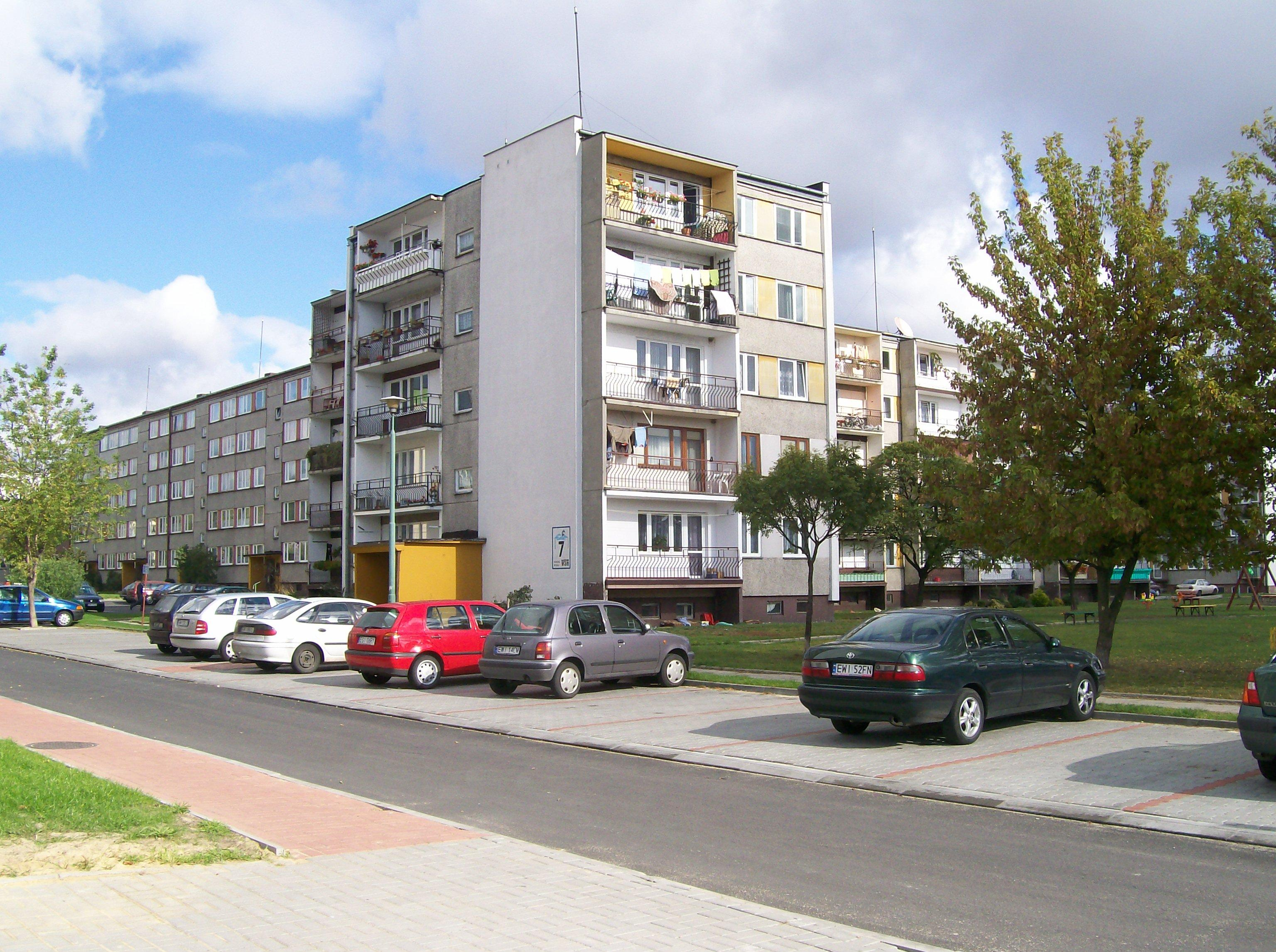 Osiedle Bugaj w Wieluniu